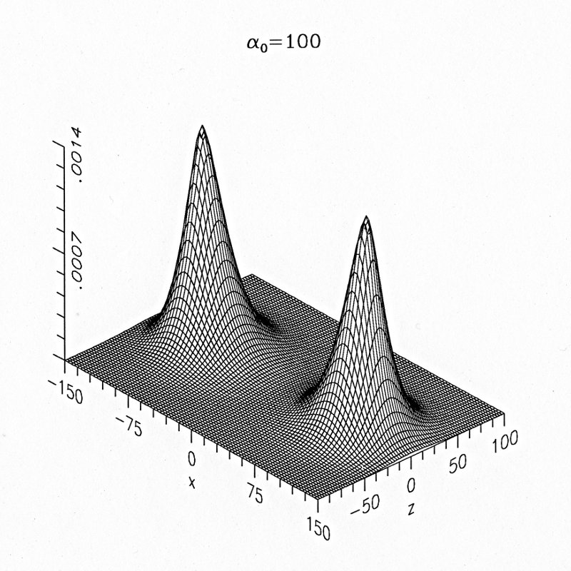 (English) Atomic dichotomy. Wave function of atomic hydrogen in a superintense high-frequency laser field, for a plane passing through the field axis; α0 = I1/2ω-2, with I the intensity and ω the frequency in atomic units.(Română) Dihotomie atomică. Funcția de undă a hidrogenului atomic într-un câmp laser supraintens de înaltă frecvență, pentru un plan care trece prin axa câmpului; α0 = I1/2ω-2, unde I este intensitatea și ω frecvența în unități atomice.